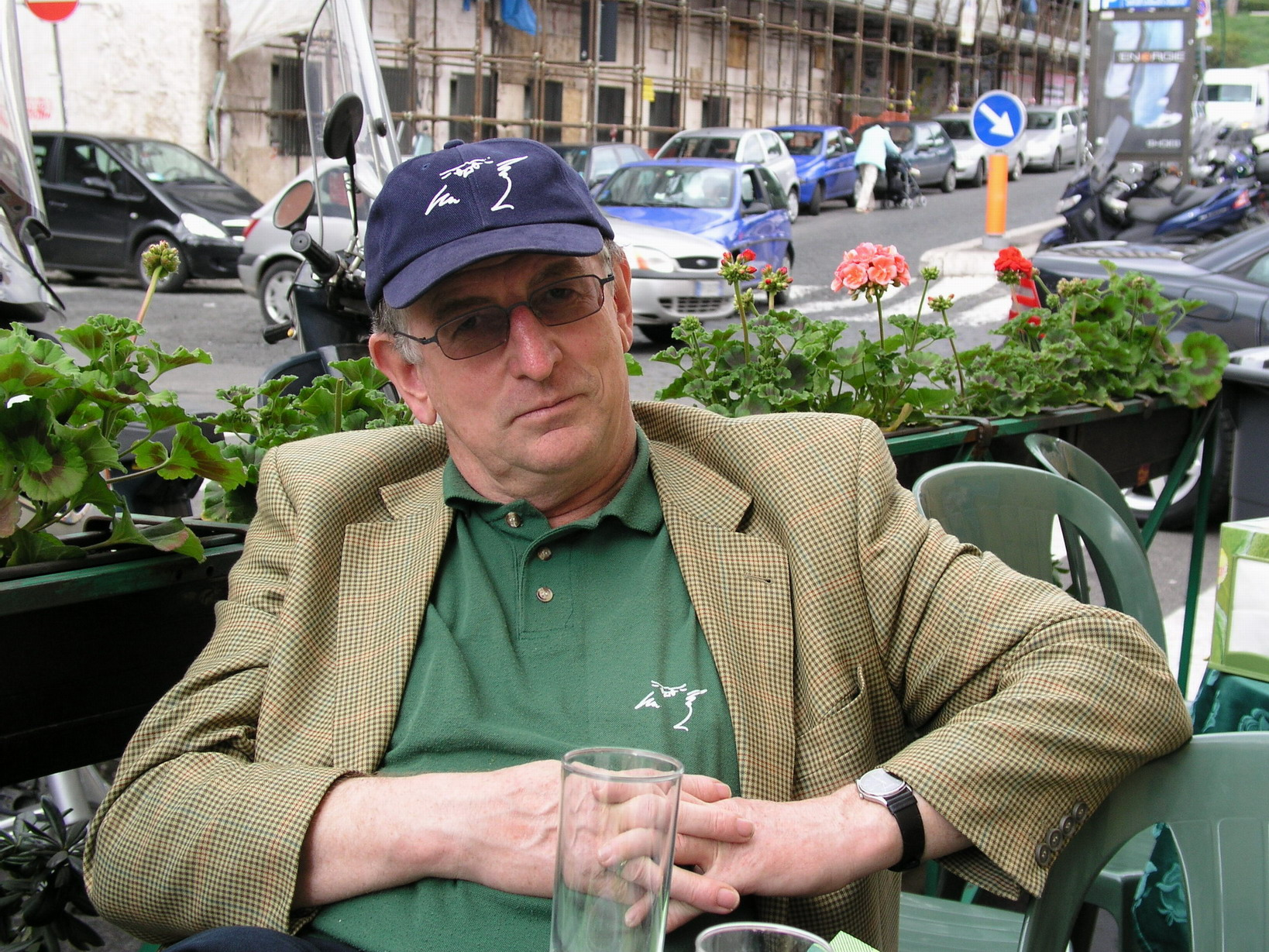 Josef Wilhelm - April 2003 Rom; eigene Aufnahme des Autors; die schriftliche Genehmigung der dargestellten Person zur Veröffentlichung des Bildes liegt dem Autor vor Personality rights warning Although this work is freely licensed or in the public domain, the person(s) shown may have rights that legally restrict certain re-uses unless those depicted consent to such uses. In these cases, a model release or other evidence of consent could protect you from infringement claims.